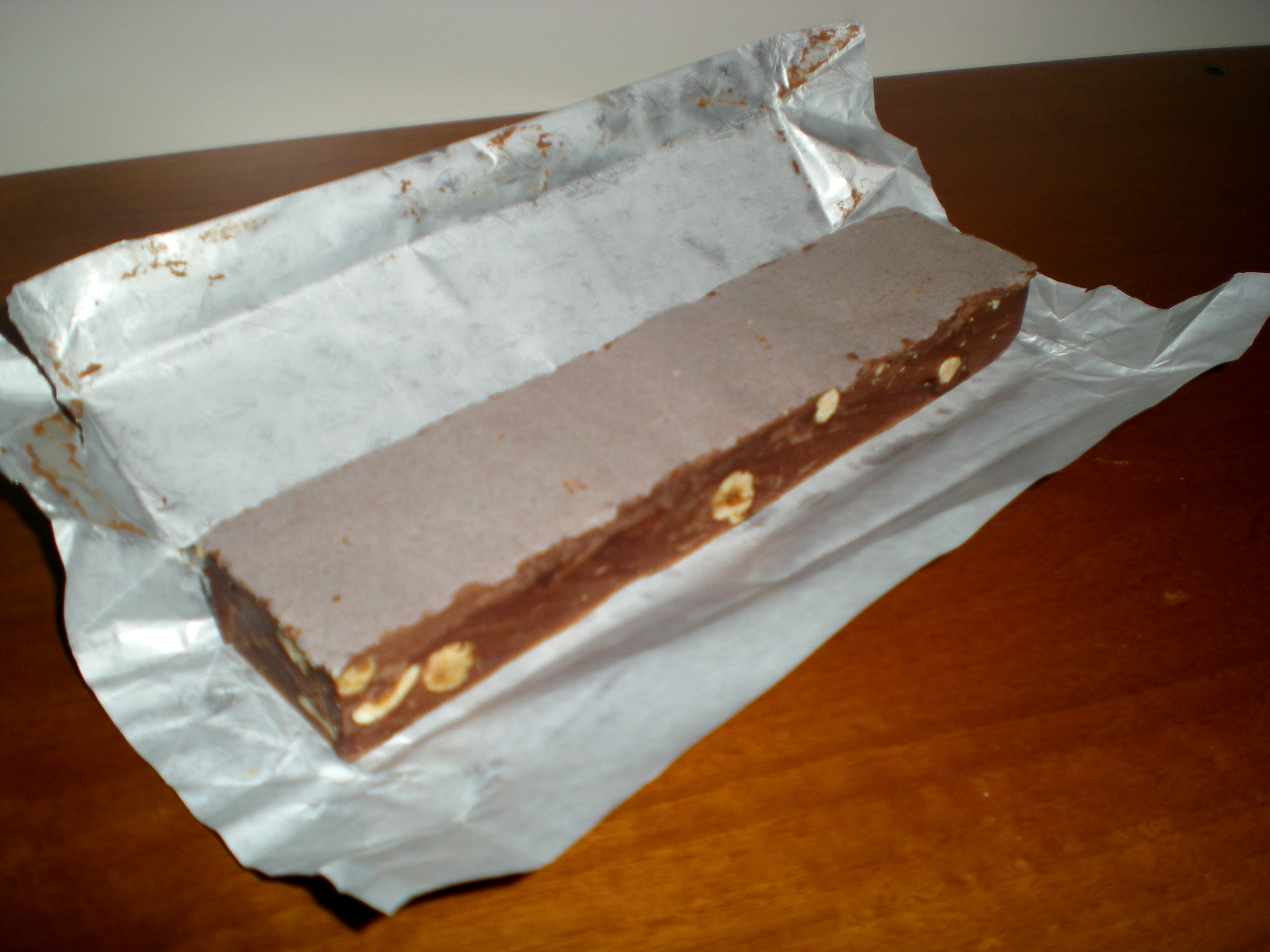 Torrone tenero al cioccolato, tipico dell'area aquilana.